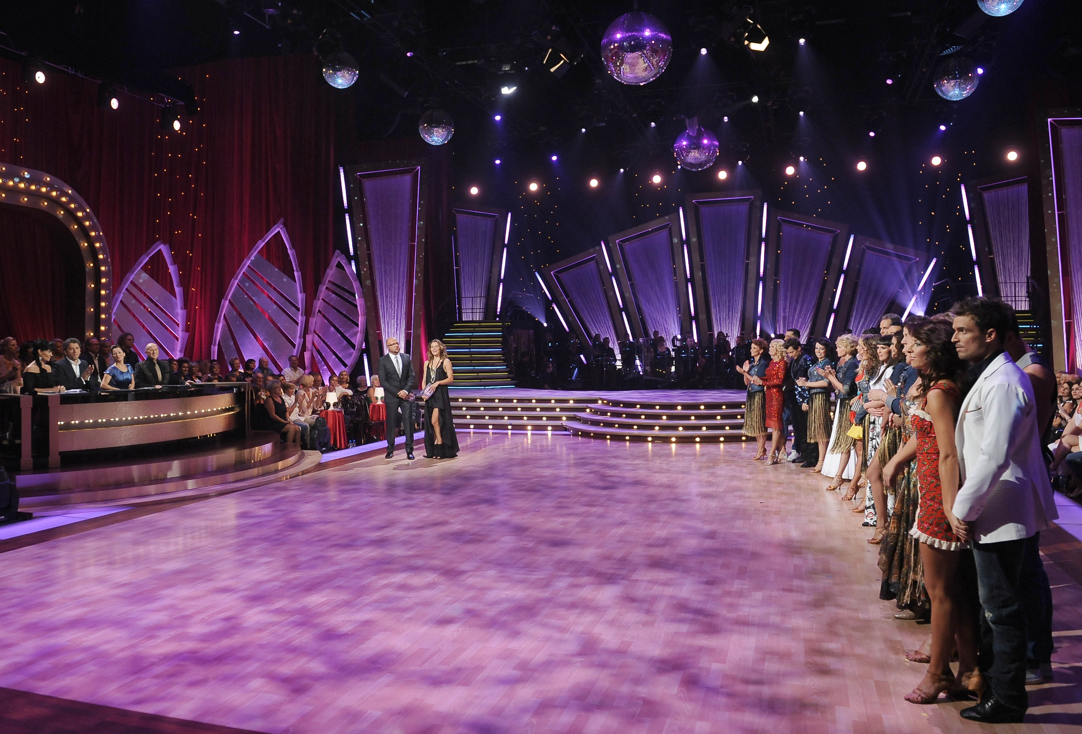 Polska edycja programu "Taniec z gwiazdami" - XIII edycja, odcinek 1 z 14.09.2011, emitowana w telewizji TVN.